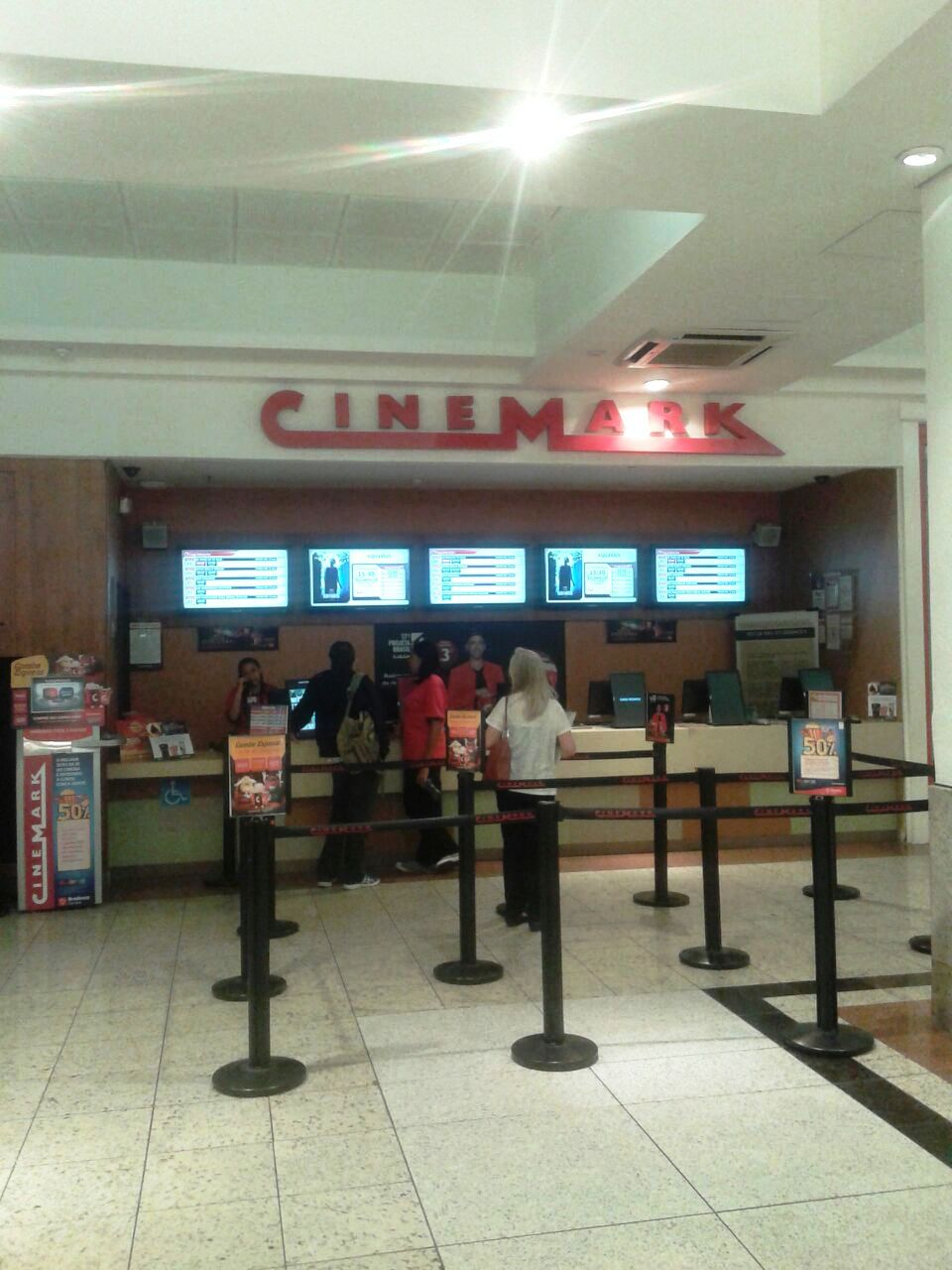 Vista do Cinemark Pátio Savassi de Belo Horizonte, MG